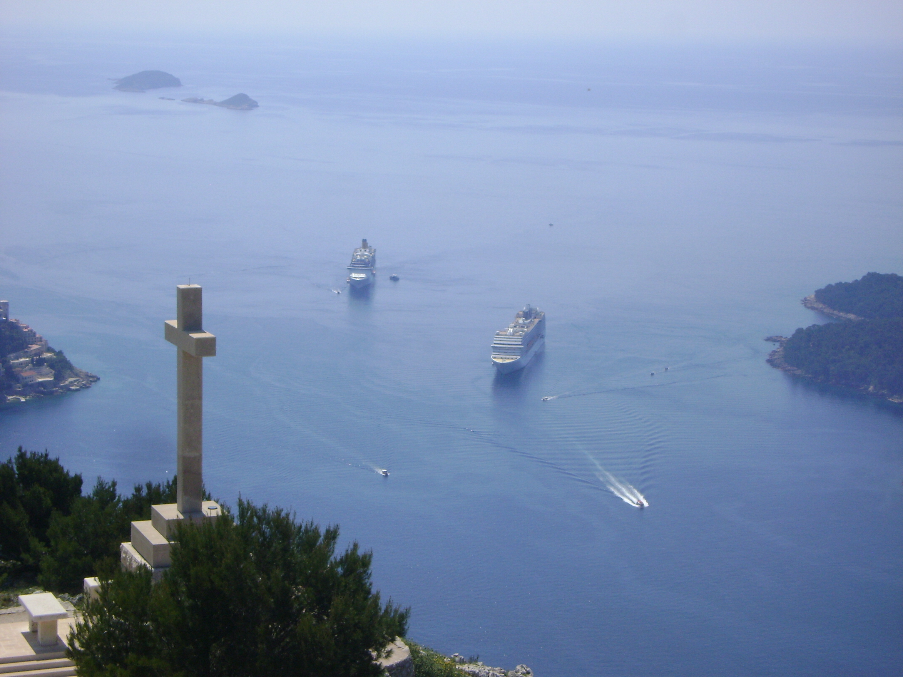 Blick vom Berg Srđ auf die Bucht von Dubrovnik (Kroatien)